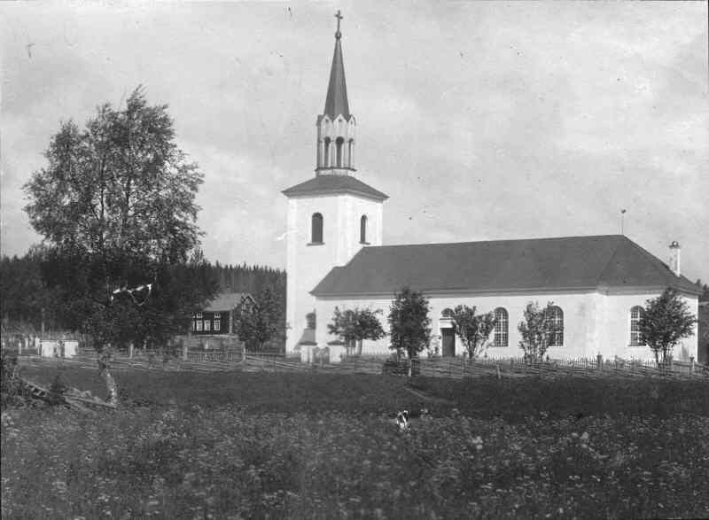 Kyrkan från sydväst. Foto omkring 1900. Kategori: (01) ExteriörerKyrkan från sydväst. Foto omkring 1900.